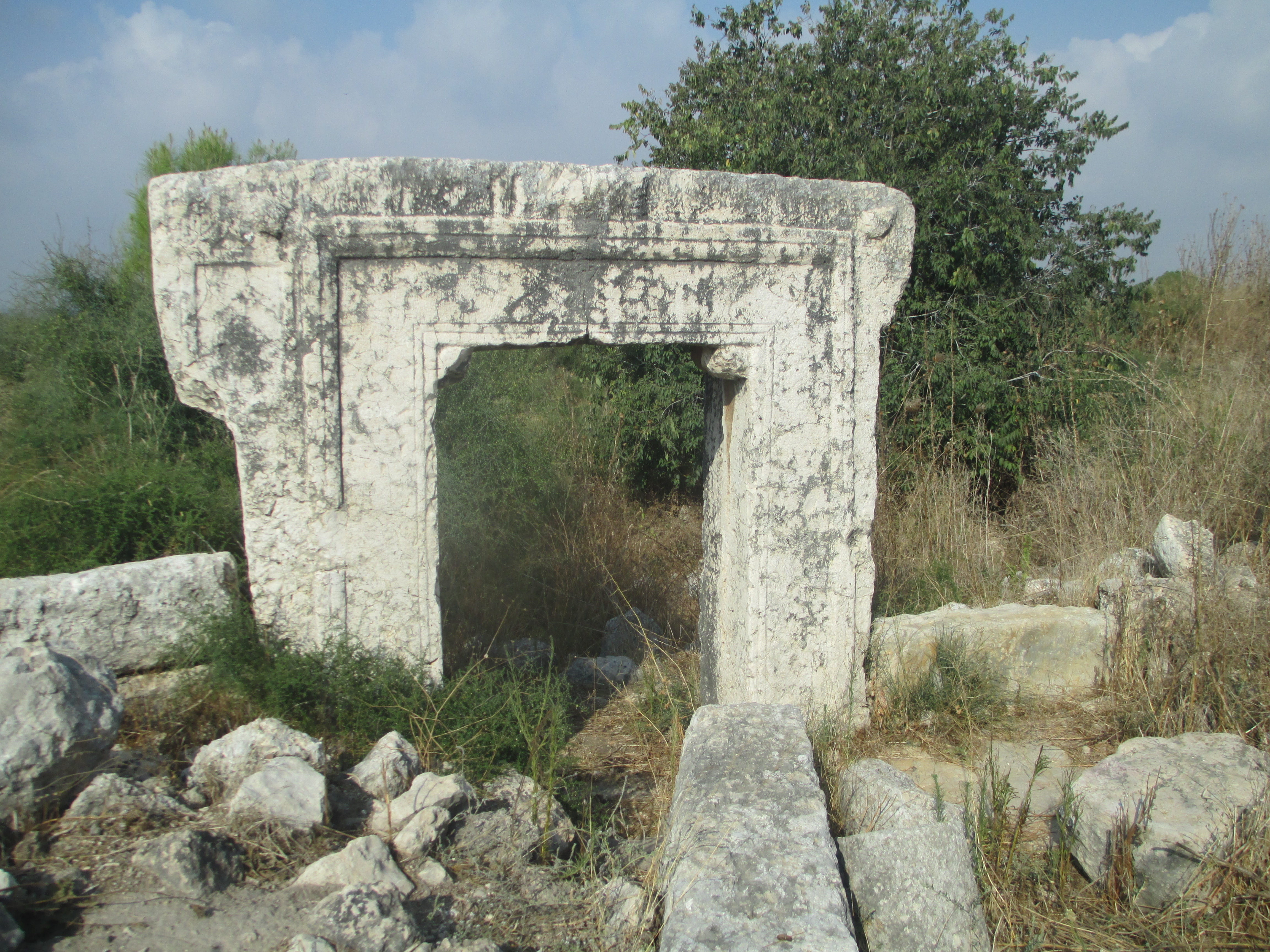 השער הרומאי בפארק מגיני מענית/נרבתה